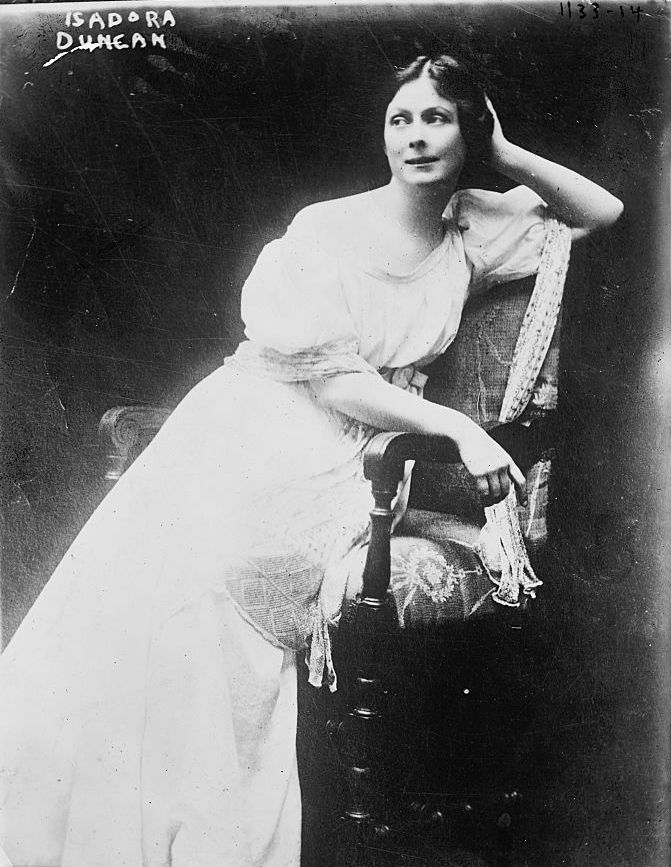 Isadora Duncan, American dancer